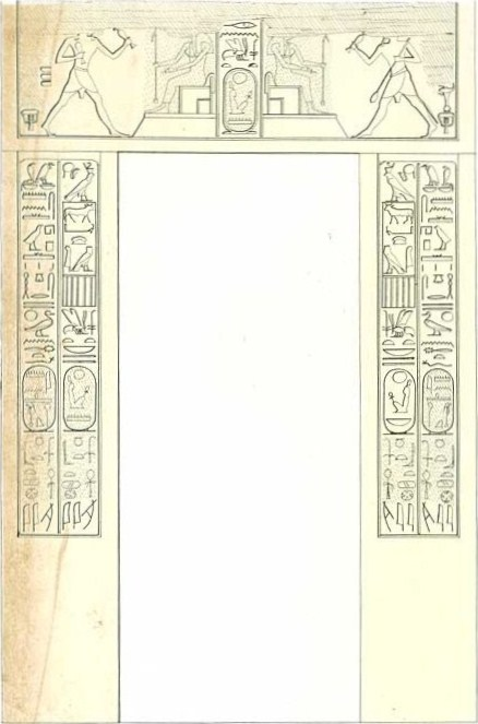 Relief am Eingang zum Tempel des Amenophis III. in el-Kab, Ägypten